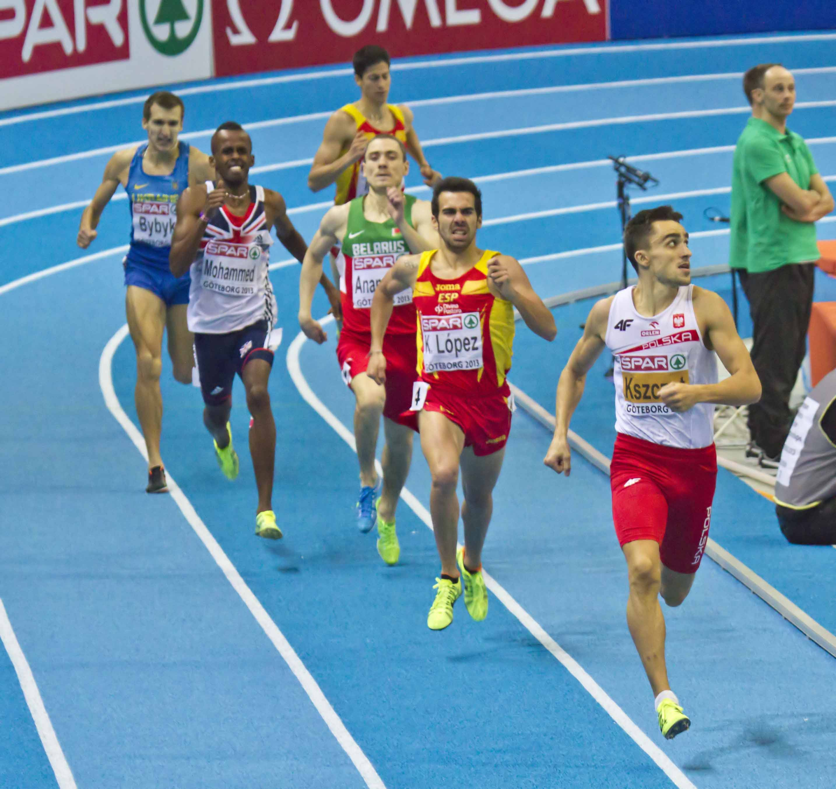 9033 finale van de 800m